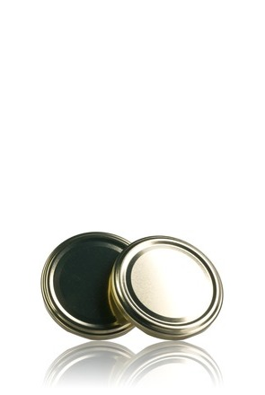 Ejemplo de tapa Twist off